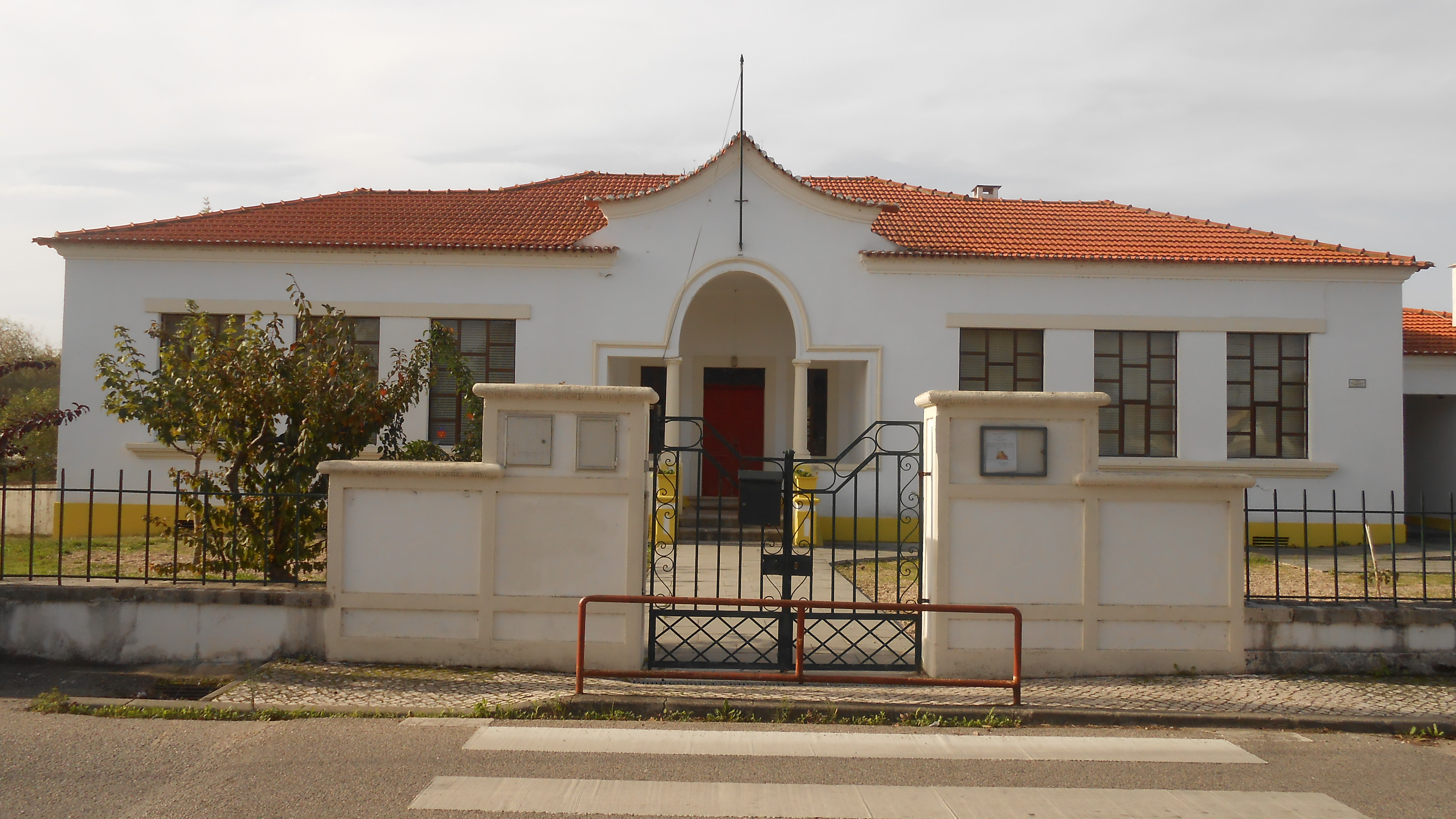 A antiga escola da Formoselha, uma localidade da freguesia de Santo Varão, concelho de Montemor-o-Velho, no distrito de Coimbra.